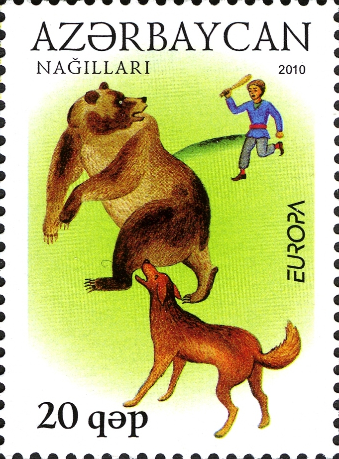 Yalançı çobanın nağılı